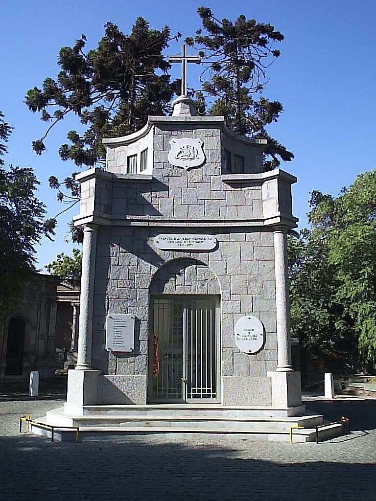 Mausoleo del General Manuel Baquedano González. From es wiki Original Autor:Alstradiaan Alstradiaan Blog Fecha:Enero de 2005 Fotografía tomada con una cámara digital Olympus camedia D-395 de 3.2 megapixeles